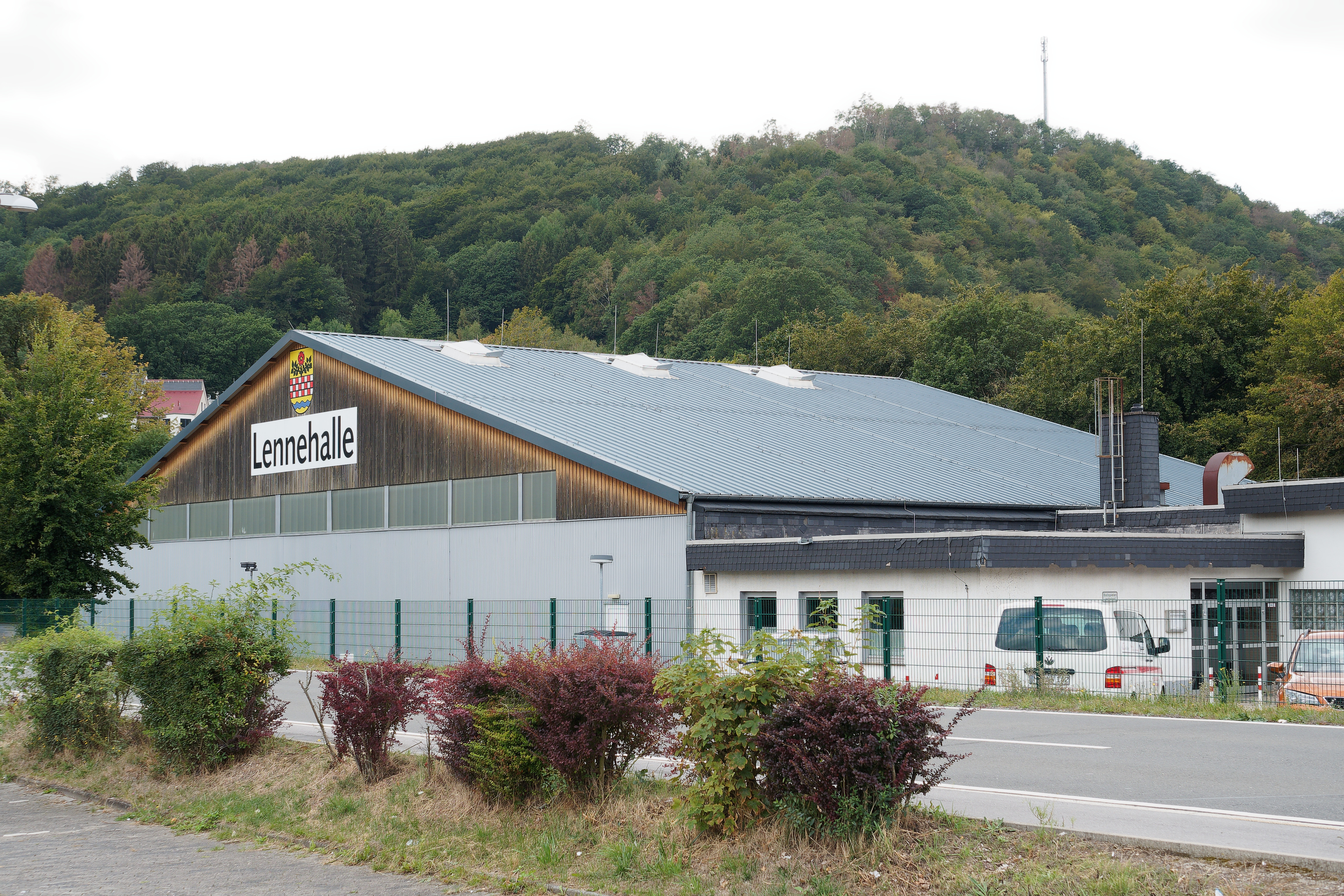 Die Lennehalle in Nachrodt-Wiblingwerde, eine Veranstaltungshalle, Holensiepen 2a.